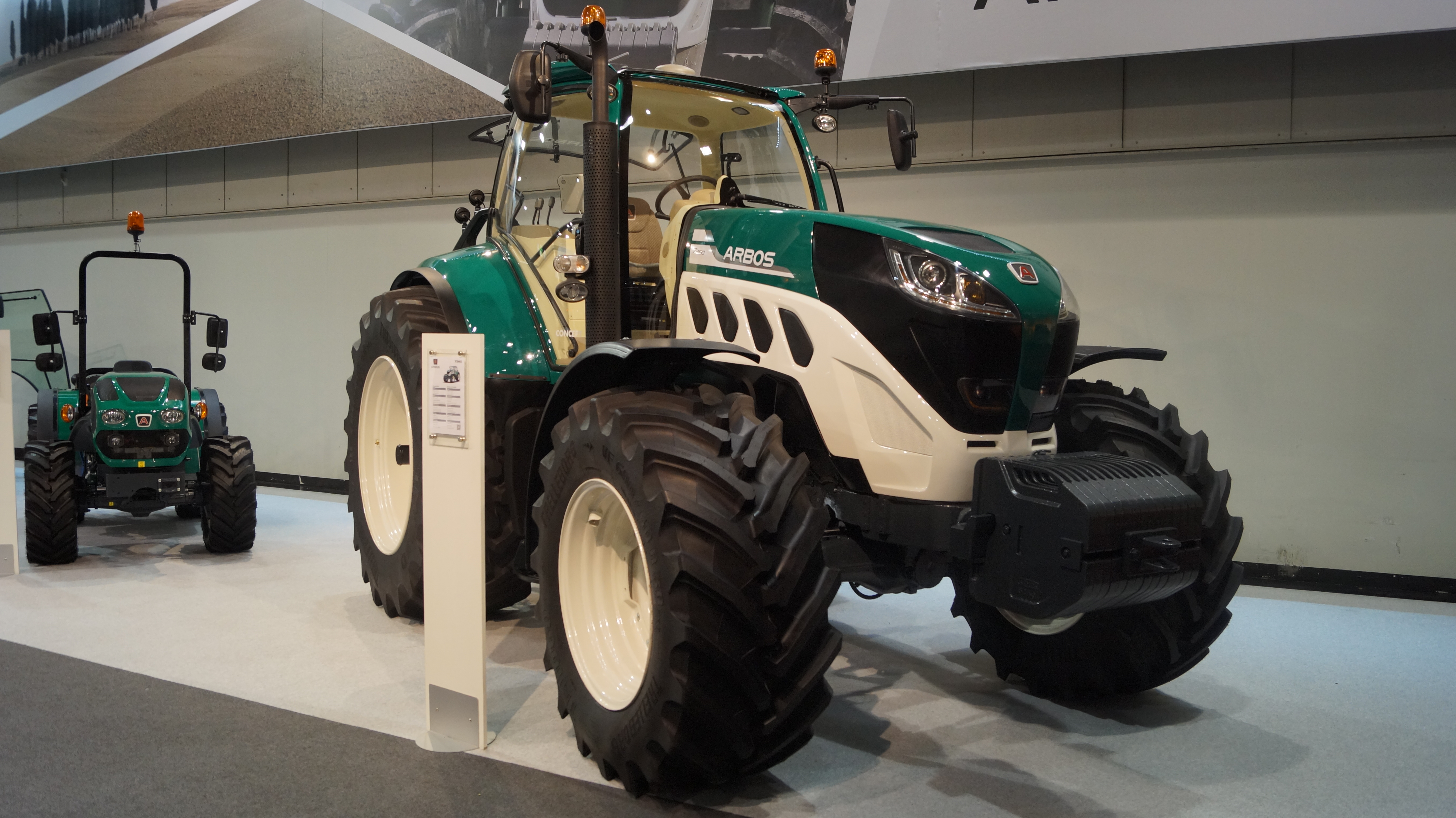 Schrägansicht der Front eines Arbos 7260, ausgestellt auf der Agritechnica 2017.